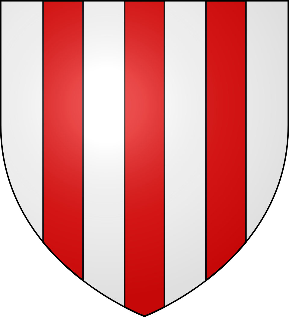 d'argent à trois pals de gueules.